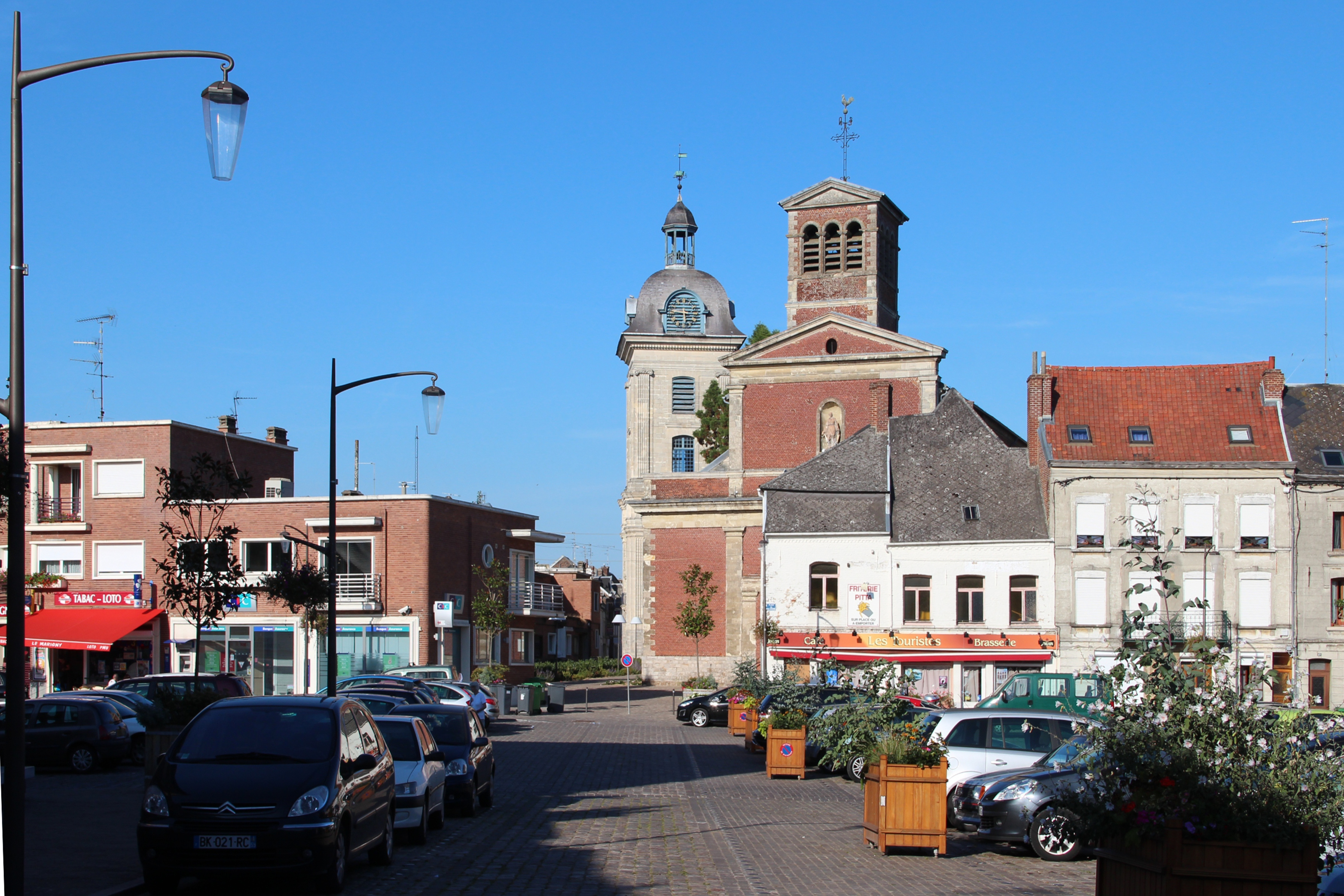 Place Général Leclerc, Le Quesnoy (département du Nord, France).